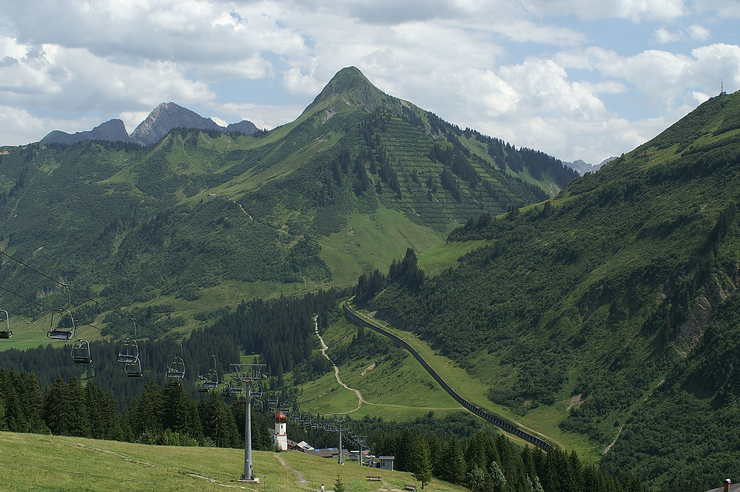 Blick oberhalb von Damüls auf das Faschinajoch 1486m mit dem Zafernhorn 2107m. Rechts die Hahnenköpfle-Galerie